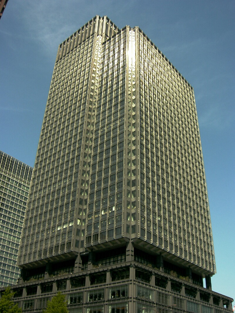 “Shin-marunouchi.Building” Japan